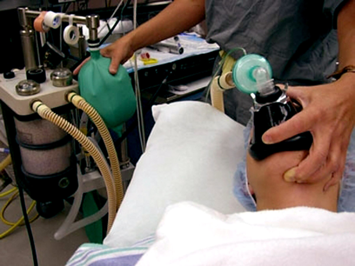 Beutel-Maskenbeatmung bei der Narkoseeinleitung